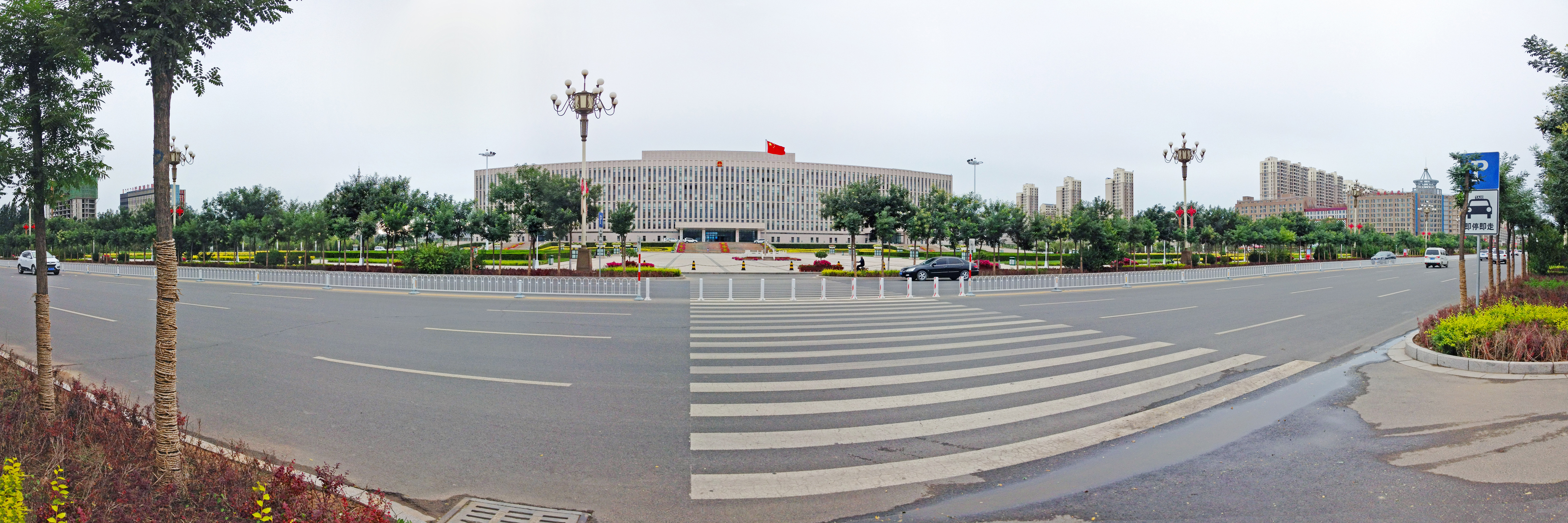 20130806内蒙巴彦淖尔市政府大楼前10车道大街